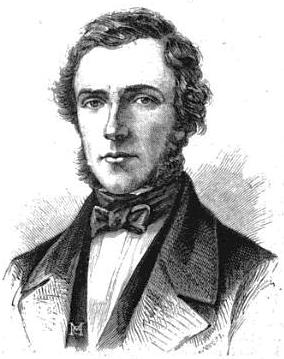 Léon Faucher (sous la Deuxième République).